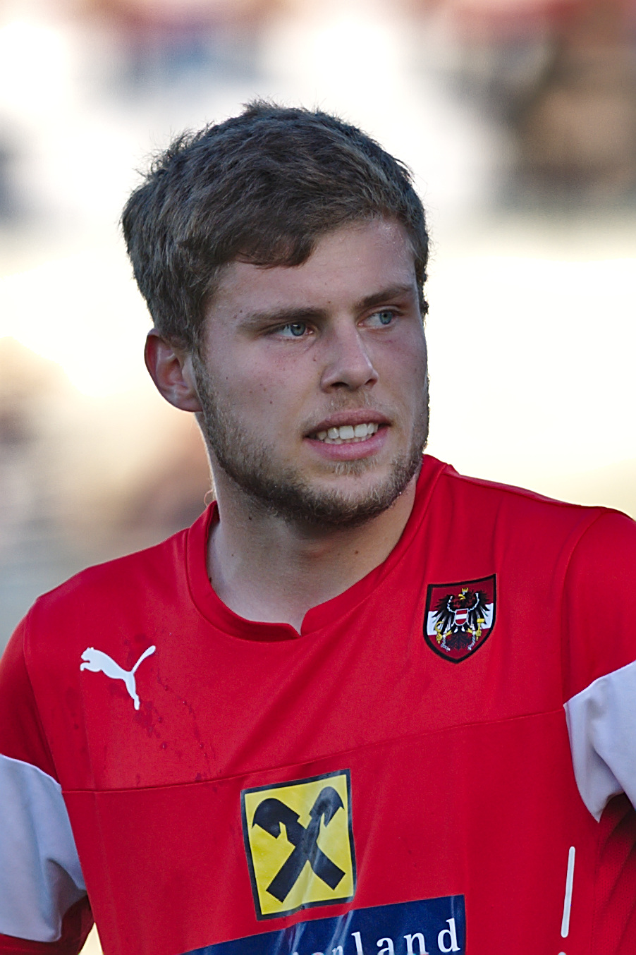 Fußball U21 EM-Qualifikation Österreich - Gibraltar, 8. Juni 2017, Ritzing: Dominik Baumgartner